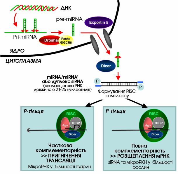 Утворення та механізм дії мікроРНК